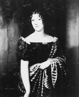 1774-1846, Gemahlin des Friedrich Erbprinzen zu Anhalt-Dessau, Tochter des Ludwig Landgraf von Hessen-Homburg